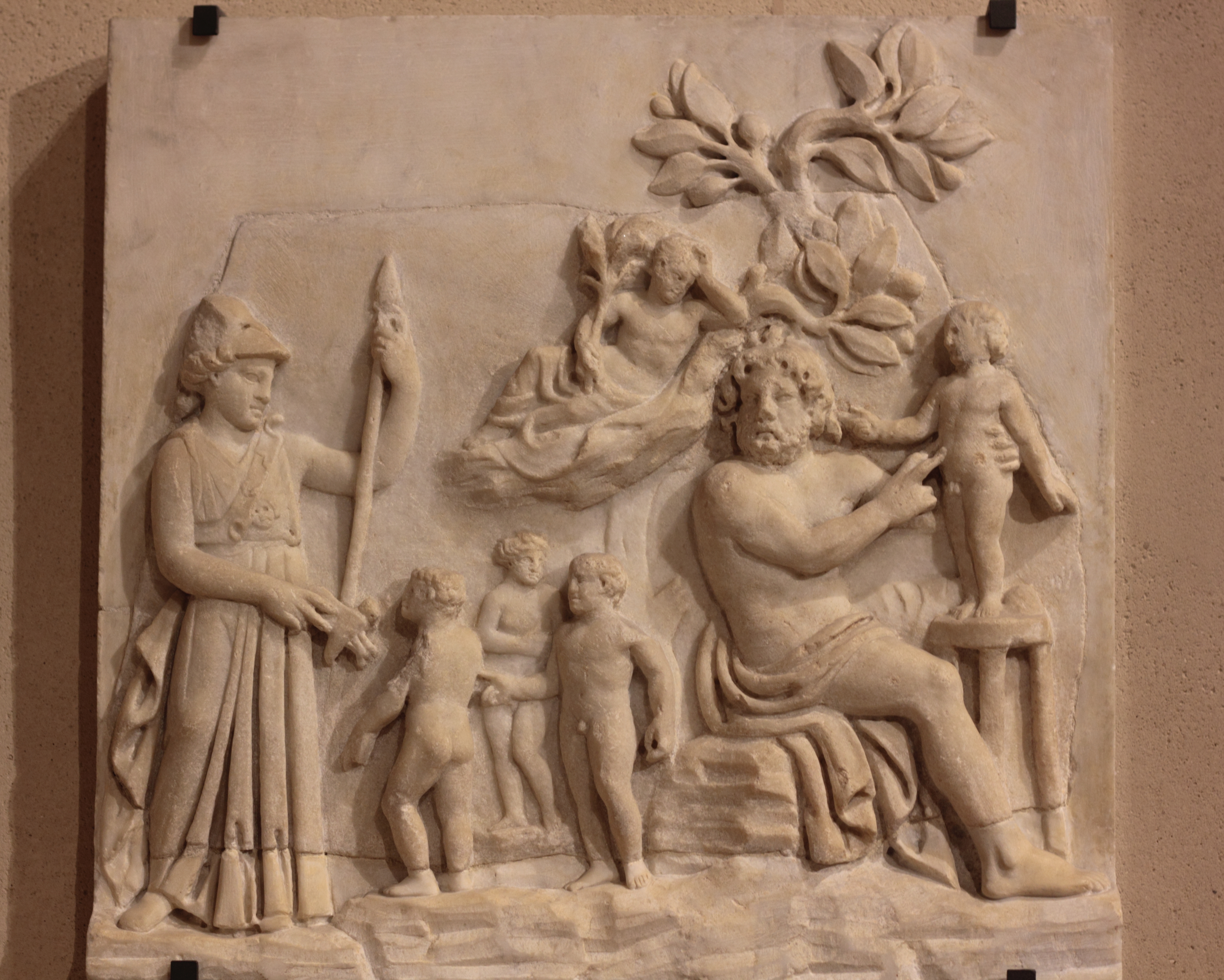 The creation of Man by Prometheus, musée du Louvre, MR 838